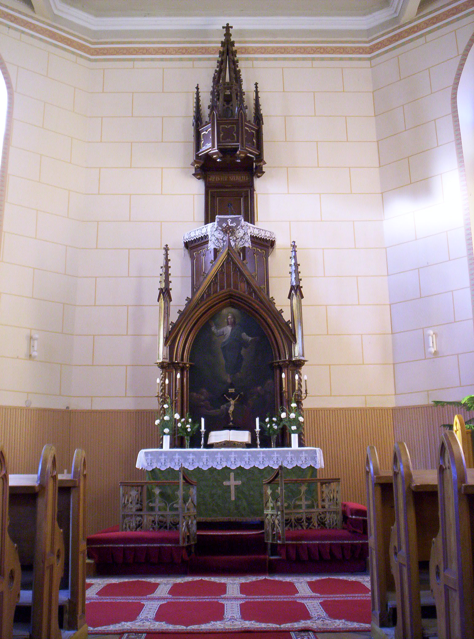 Pulpit & altar of the Lutheran Church in Pápa, Hungary A pápai evangélikus templom szószékoltára